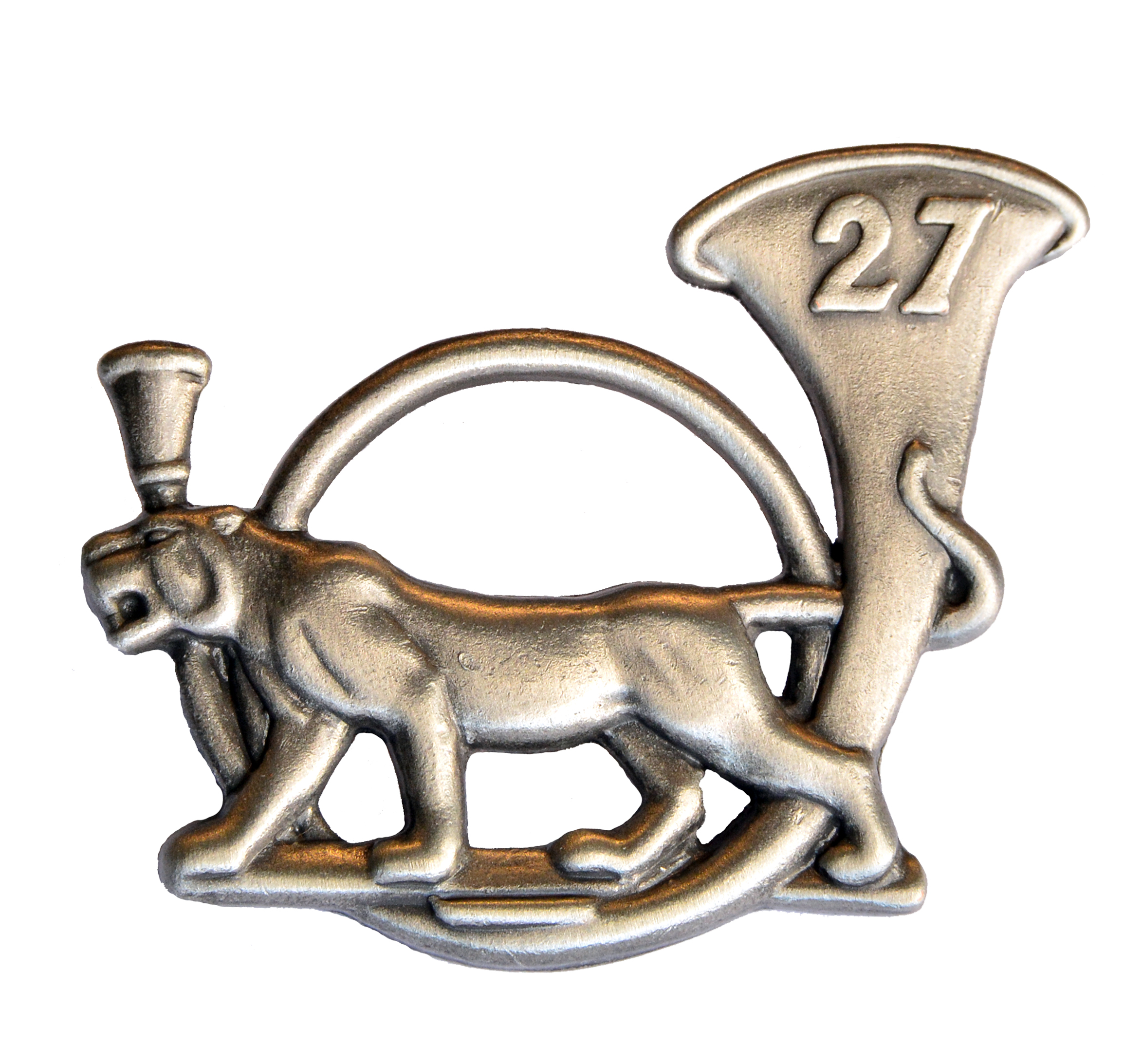 Insigne du 27e bataillon de chasseurs alpins